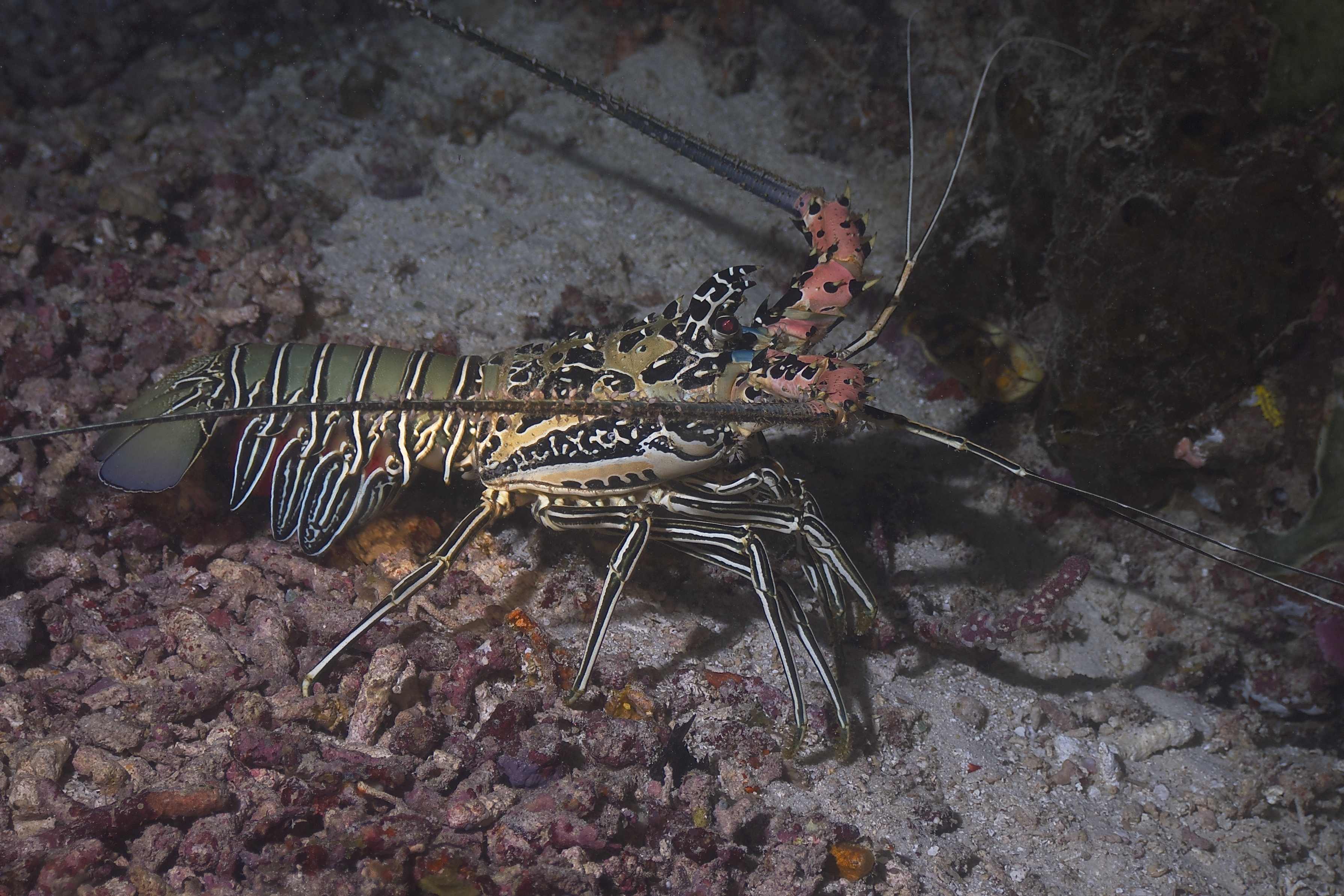 Panulirus versicolor